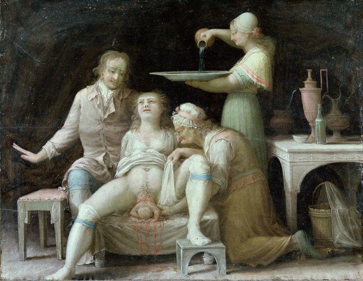 Accouchement, peinture française anonyme vers 1800.